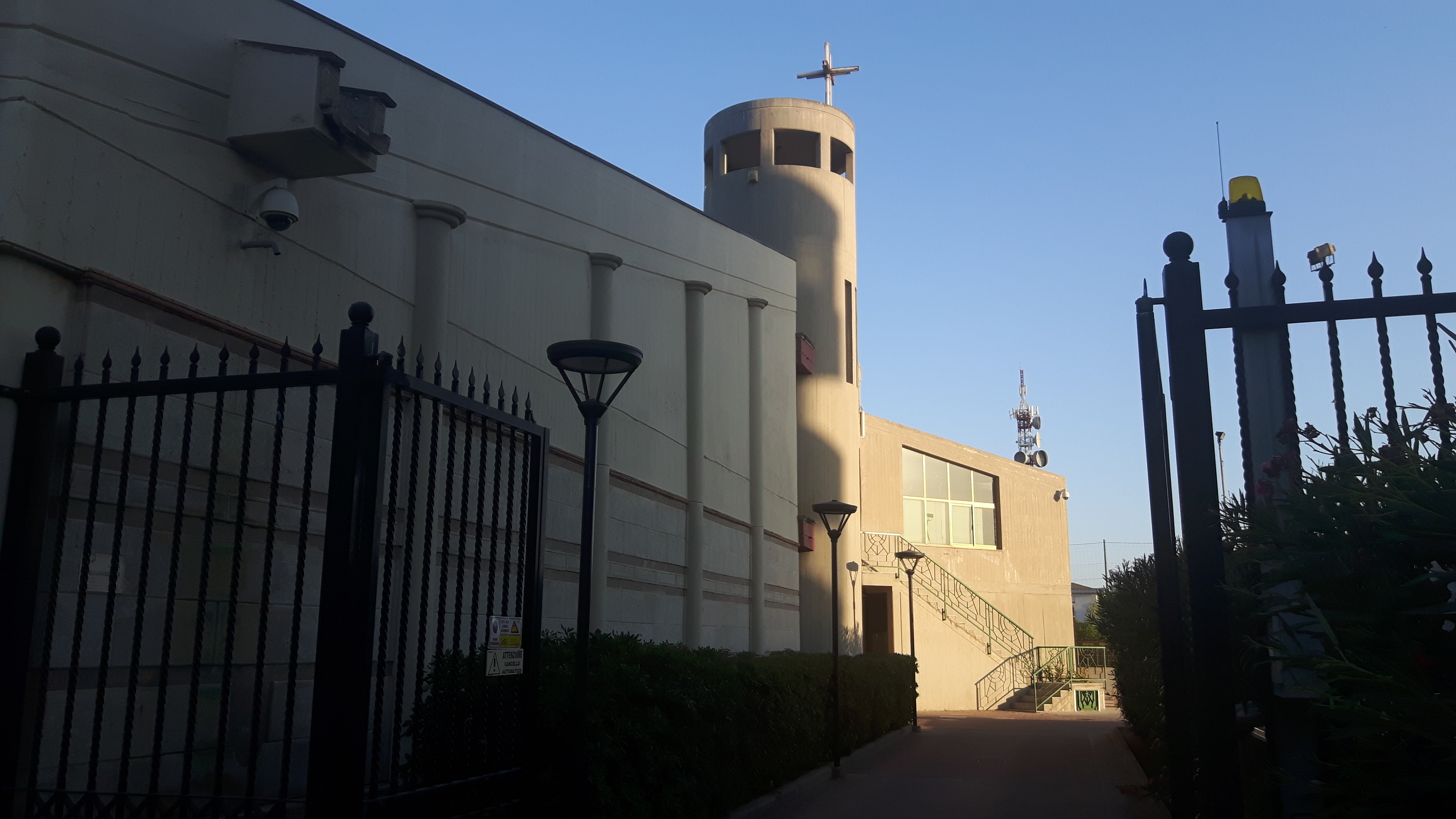 Chiesa dello Spirito Santo (Selargius).